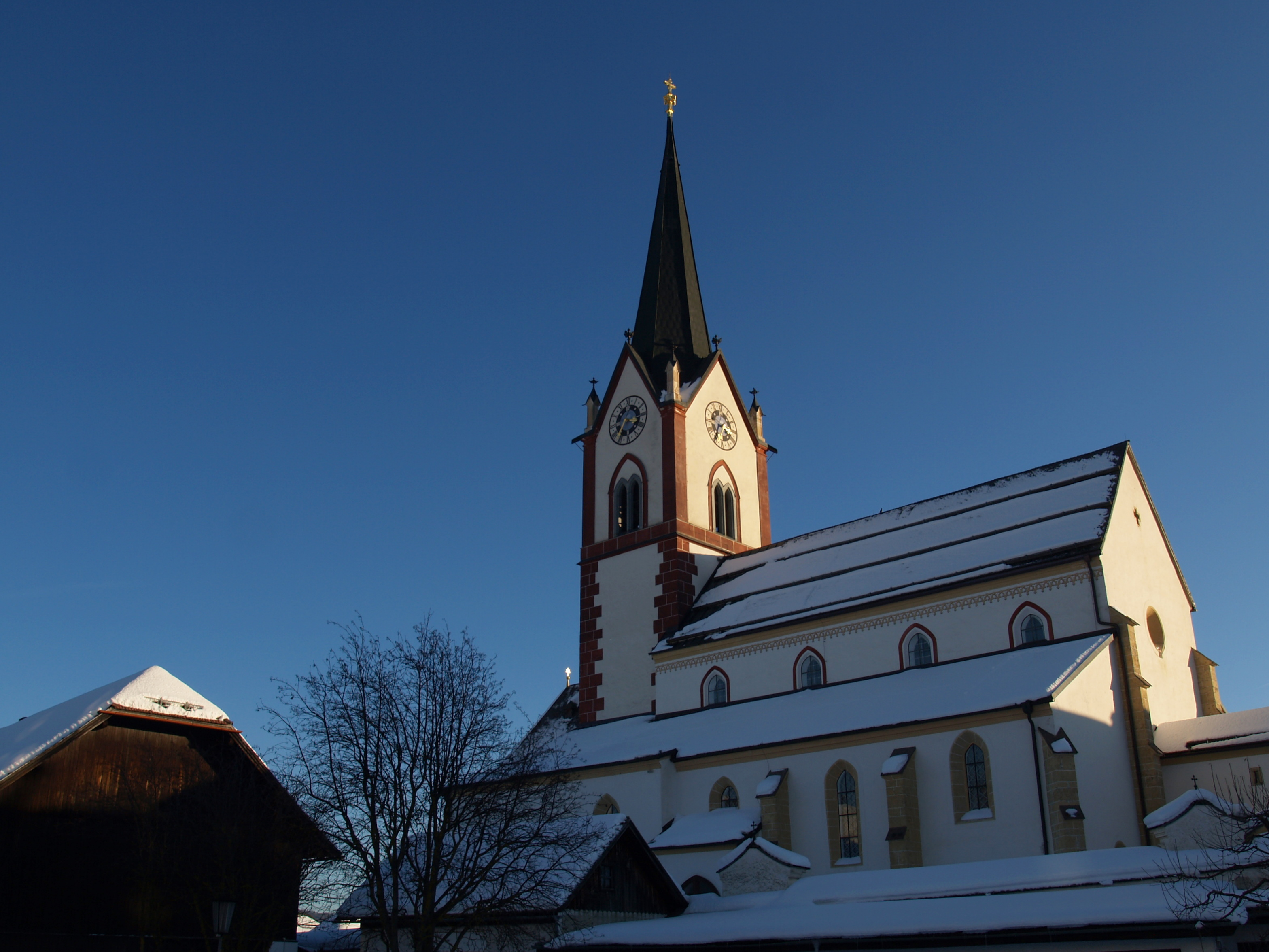 Kath. Pfarrkirche Unsere Liebe Frau Mariä Himmelfahrt, Ansicht von der Nordseite